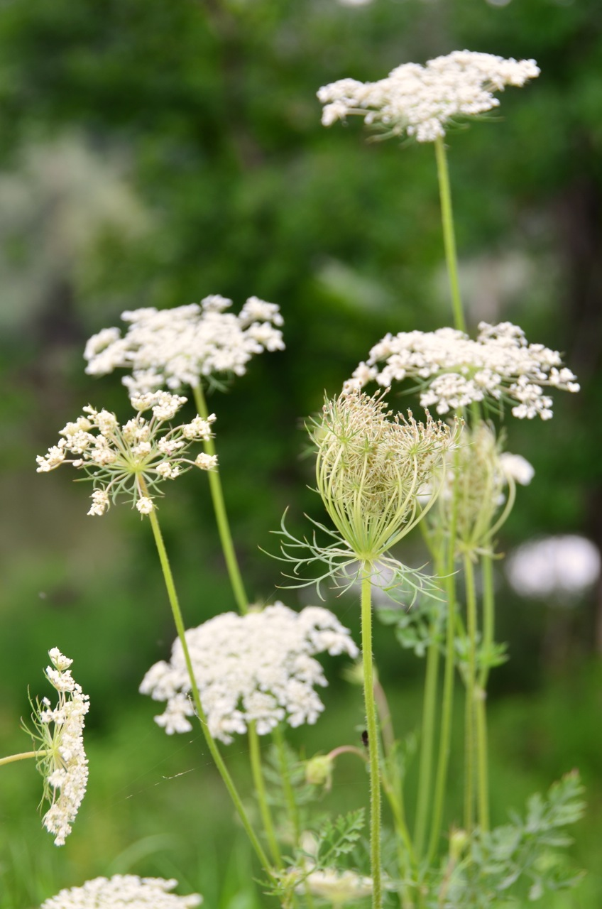 Daucus carota